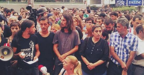 Adalet Yürüyüşü Galatasaray Lisesi Önünde